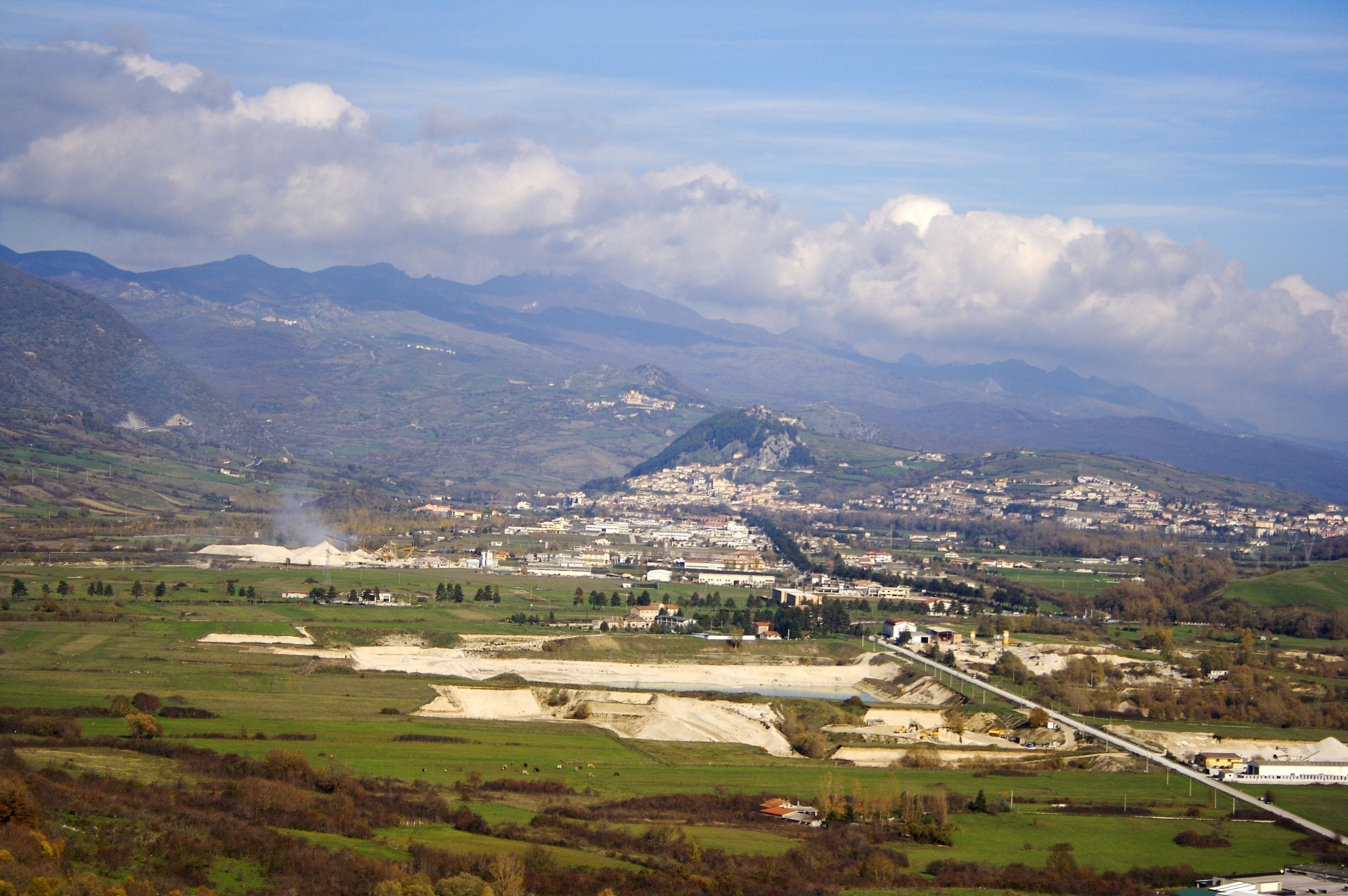 Foto della valle altosangrina con Castel di Sangro sullo sfondo